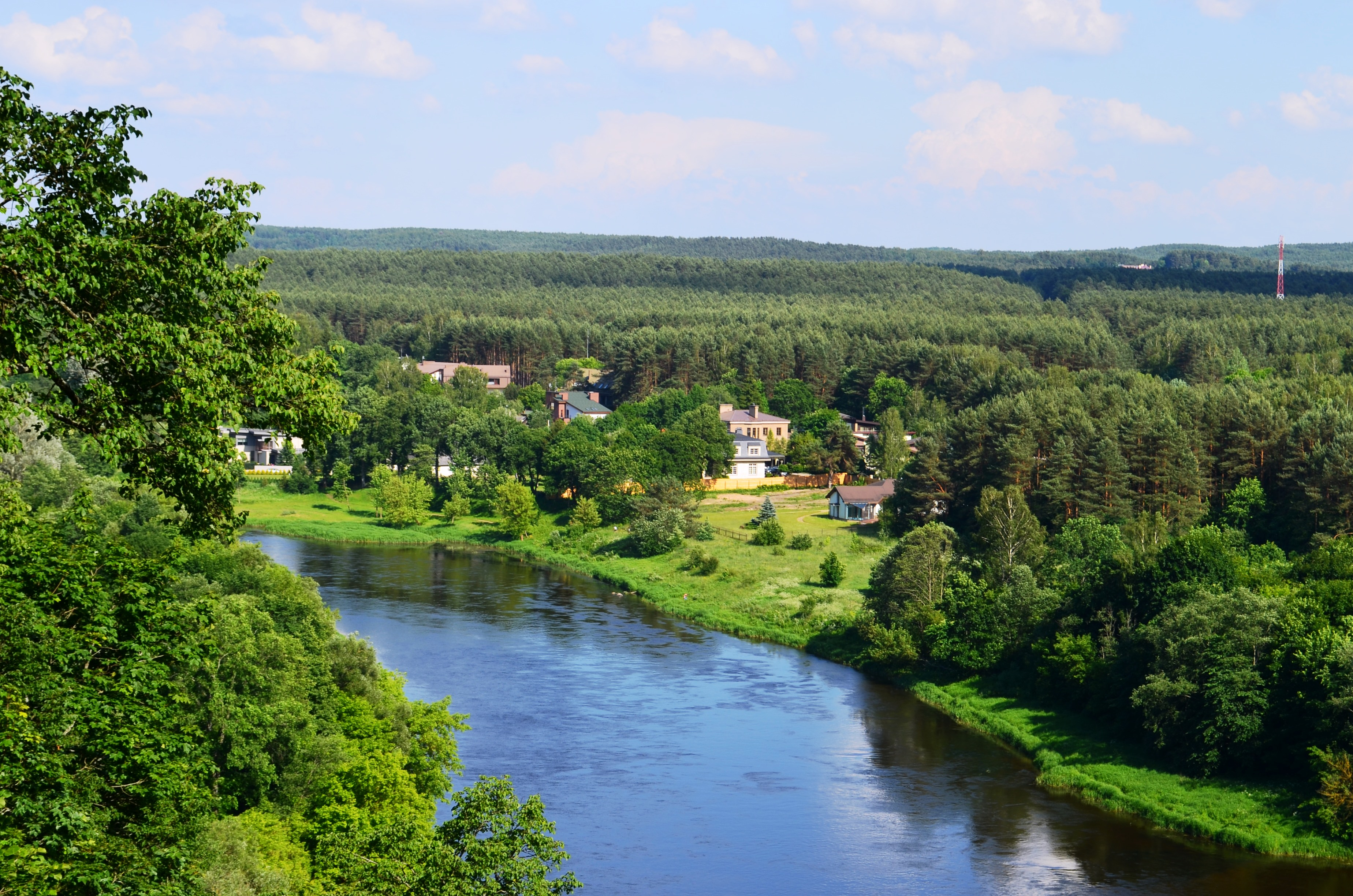 Vaizdas į Valakampius nuo Verkių rūmų, Vilnius